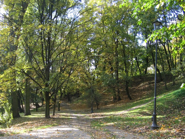 Skarpa w Parku na Książęcem w Warszawie